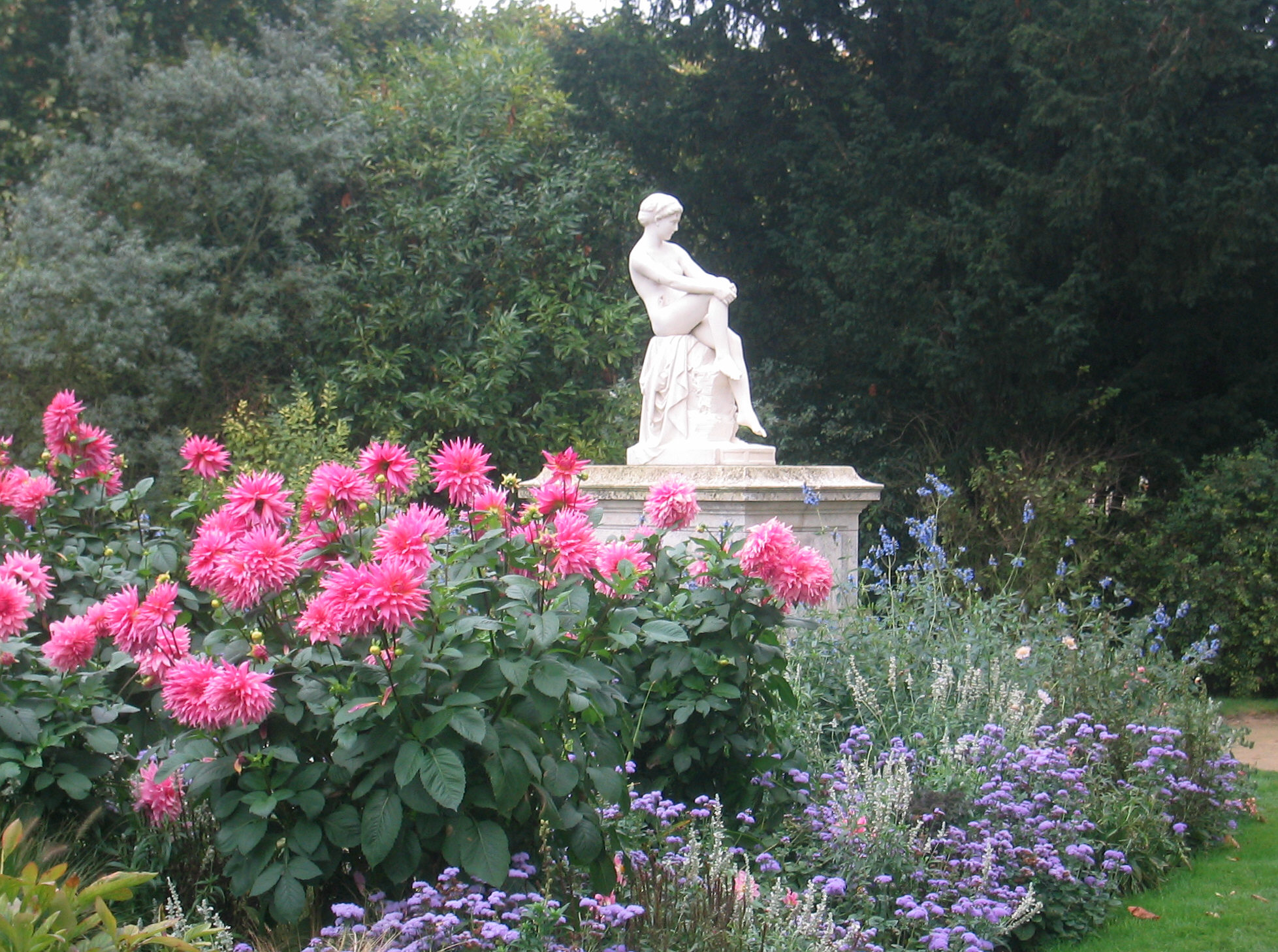 Anatole Marquet de Vasselot (Français, 1840-1904): Chloé à la fontaine, 1873, marbre, parc du château de Compiègne, France